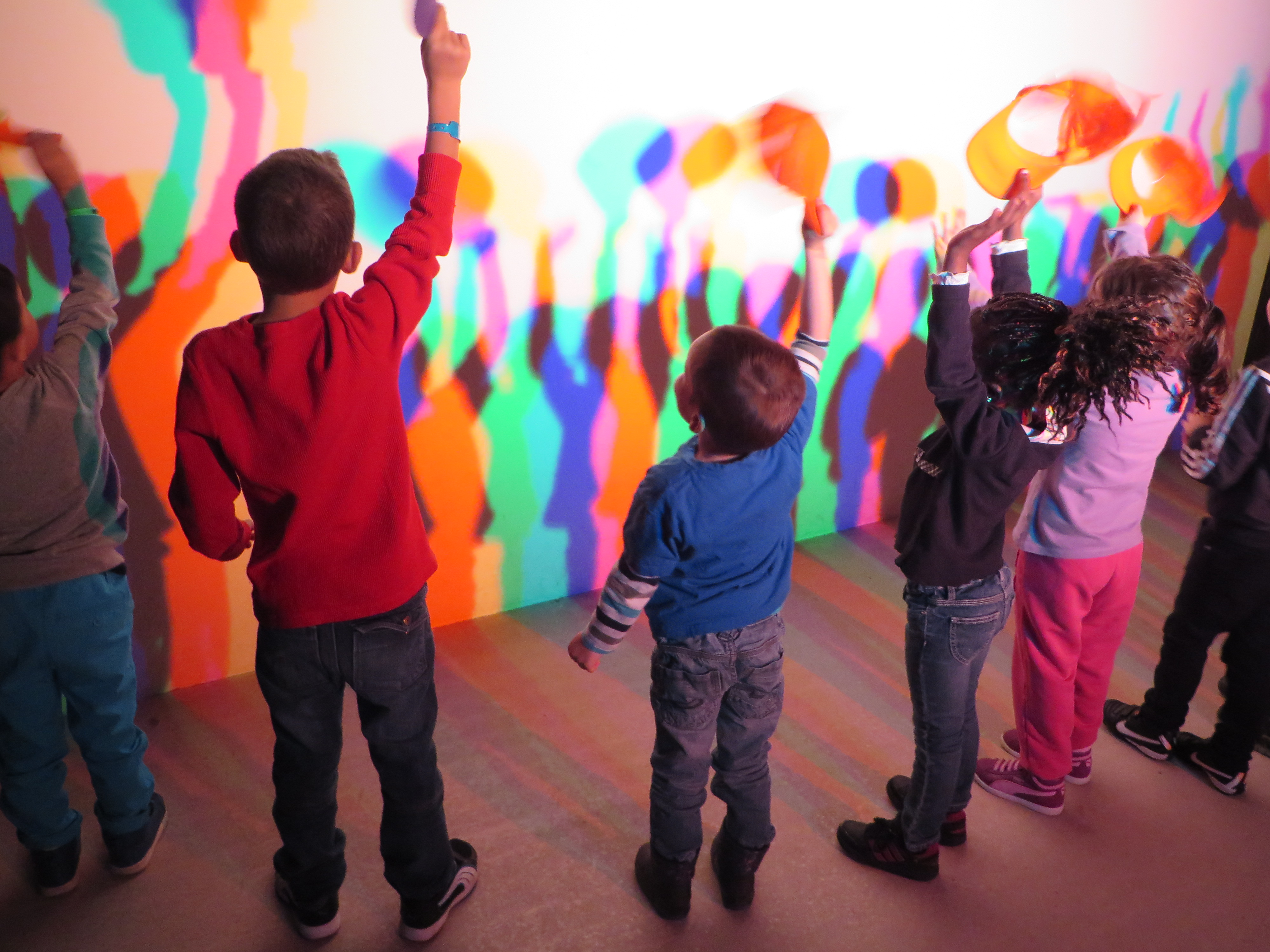 Im Farbenraum kann man erleben, wie aus weissem Licht Farbe wird und aus Farben weisses Licht.